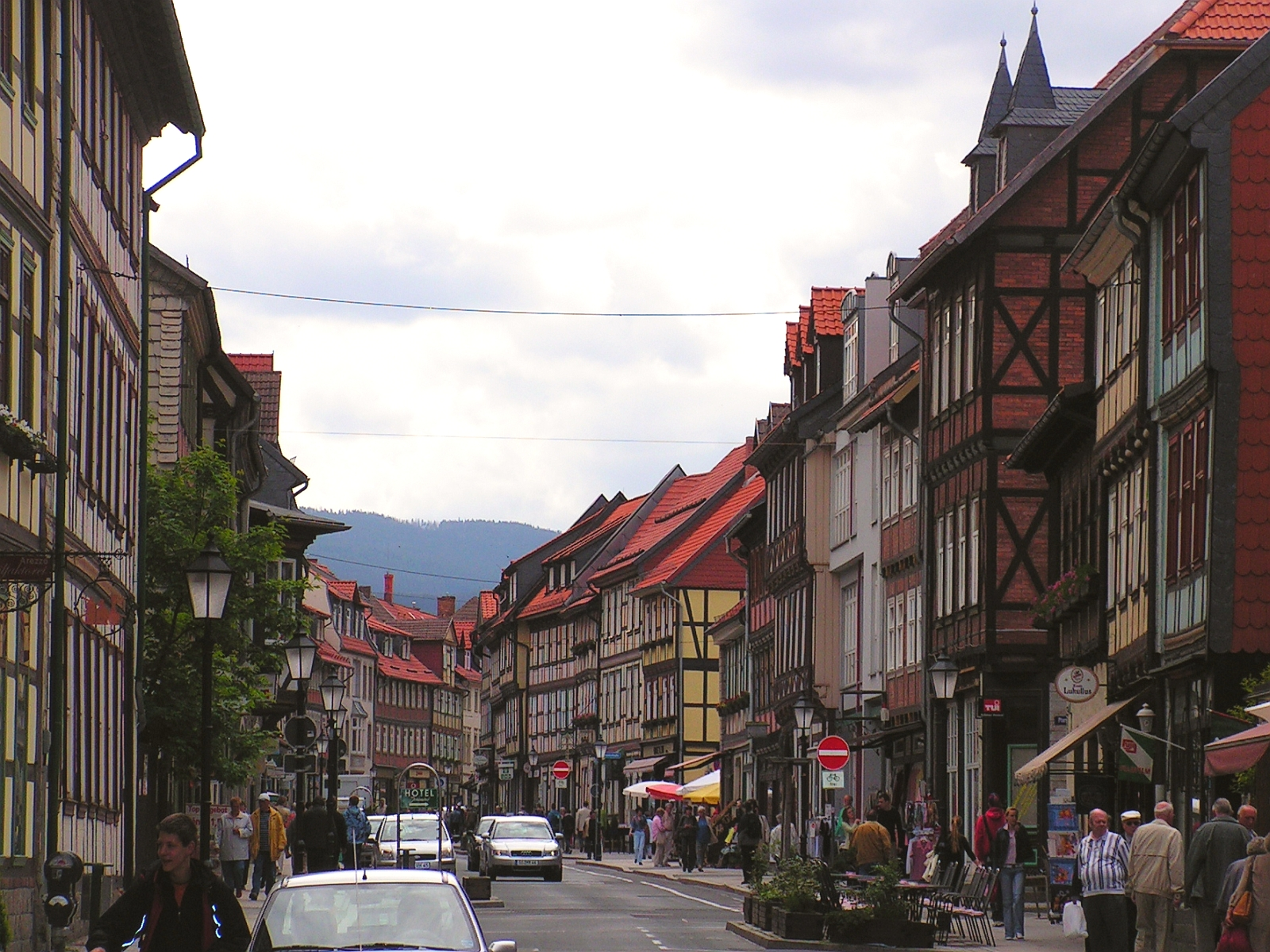 Wernigerode Sehenswürdigkeiten Handwerk und Fachwerkhäuser in der Altstadt